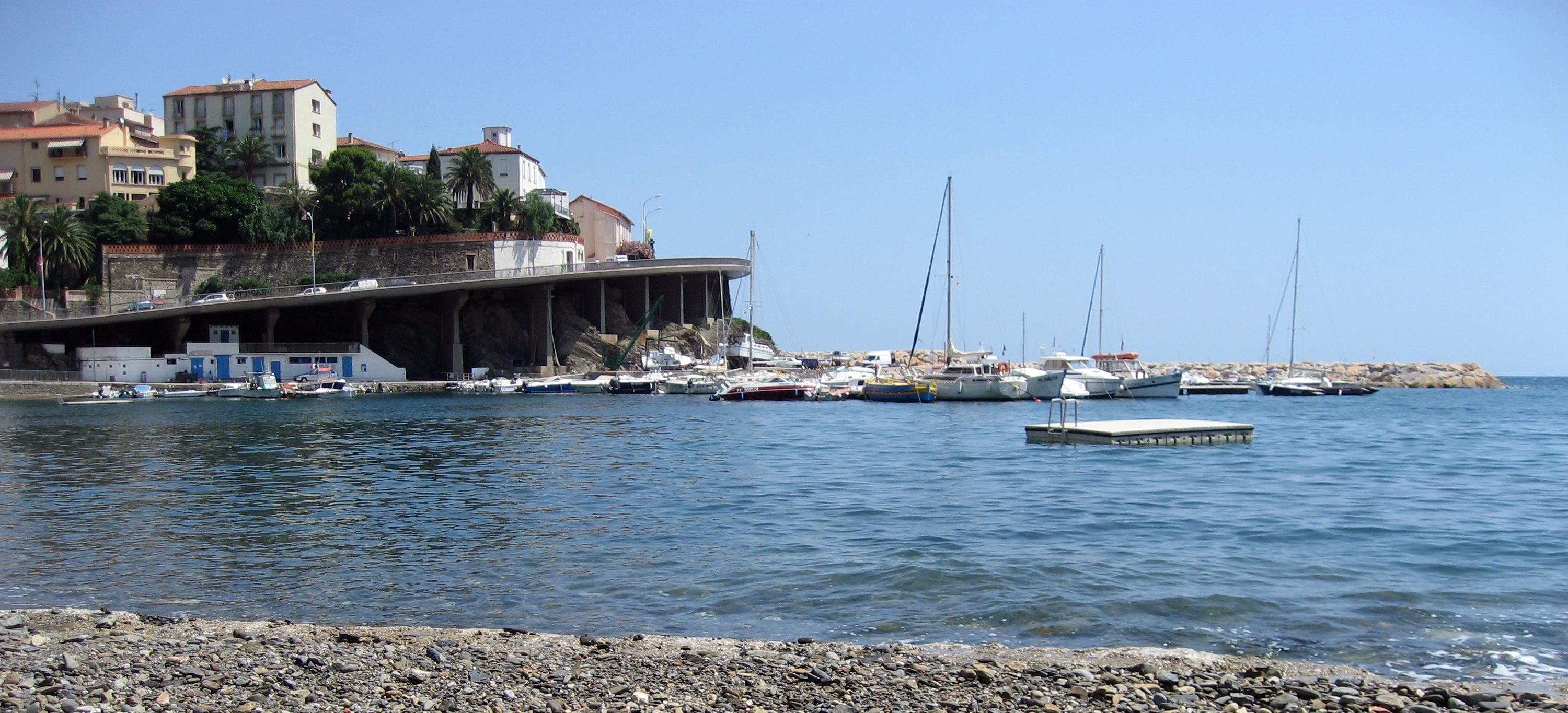 Cerbére